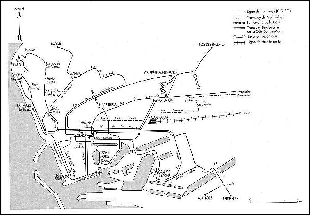 Plan du tramway du Havre